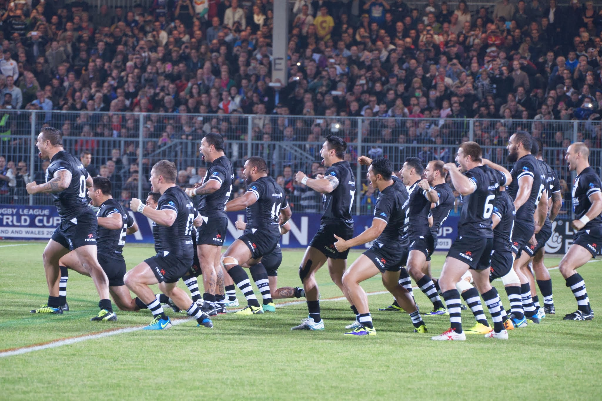 Le Haka de l'équipe nationale de Nouvelle-Zélande de rugby à XIII lors de leur rencontre face à la France à Avignon.